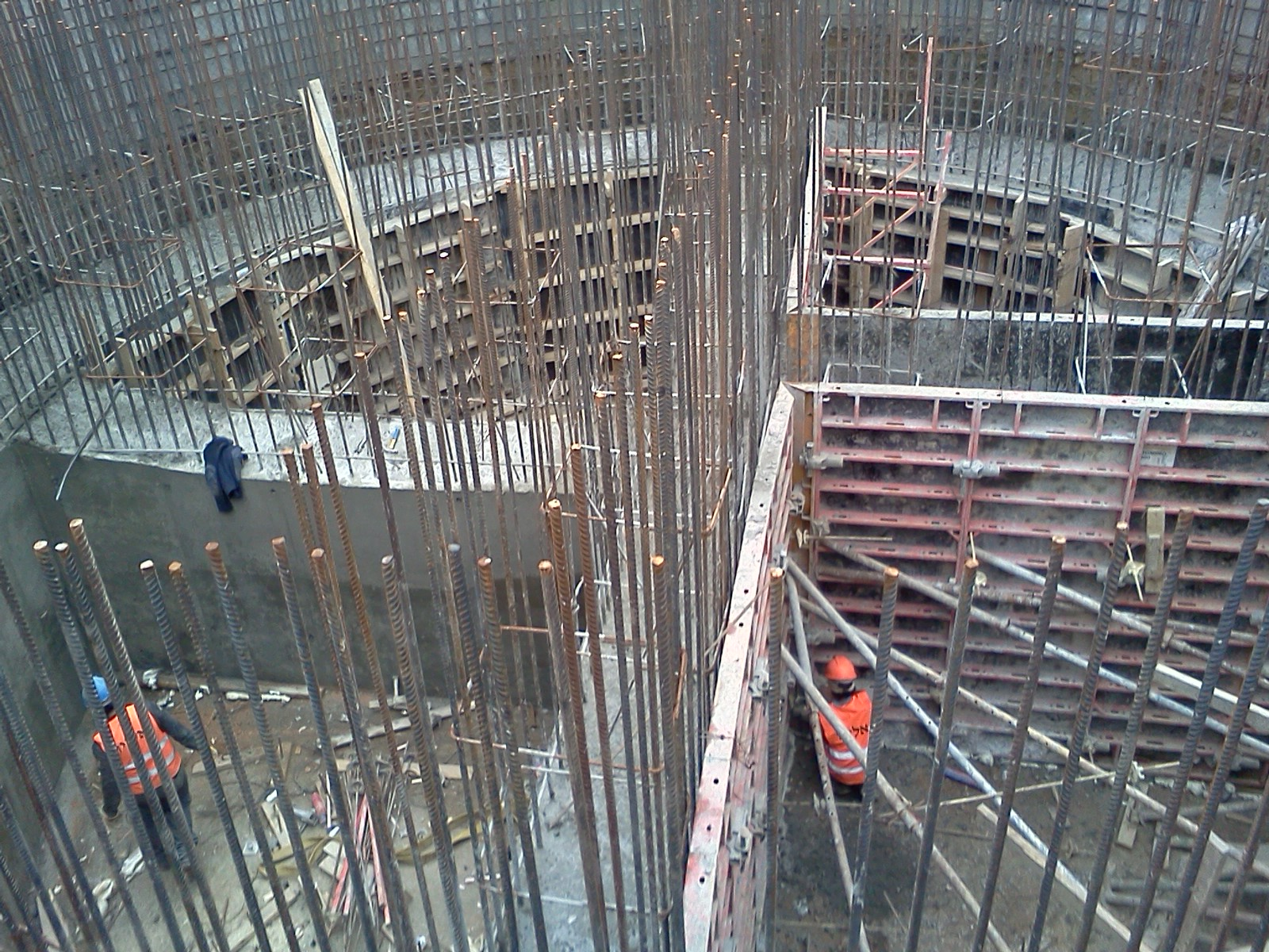 יסוד באר בגשר 10 ברכבת לירושלים